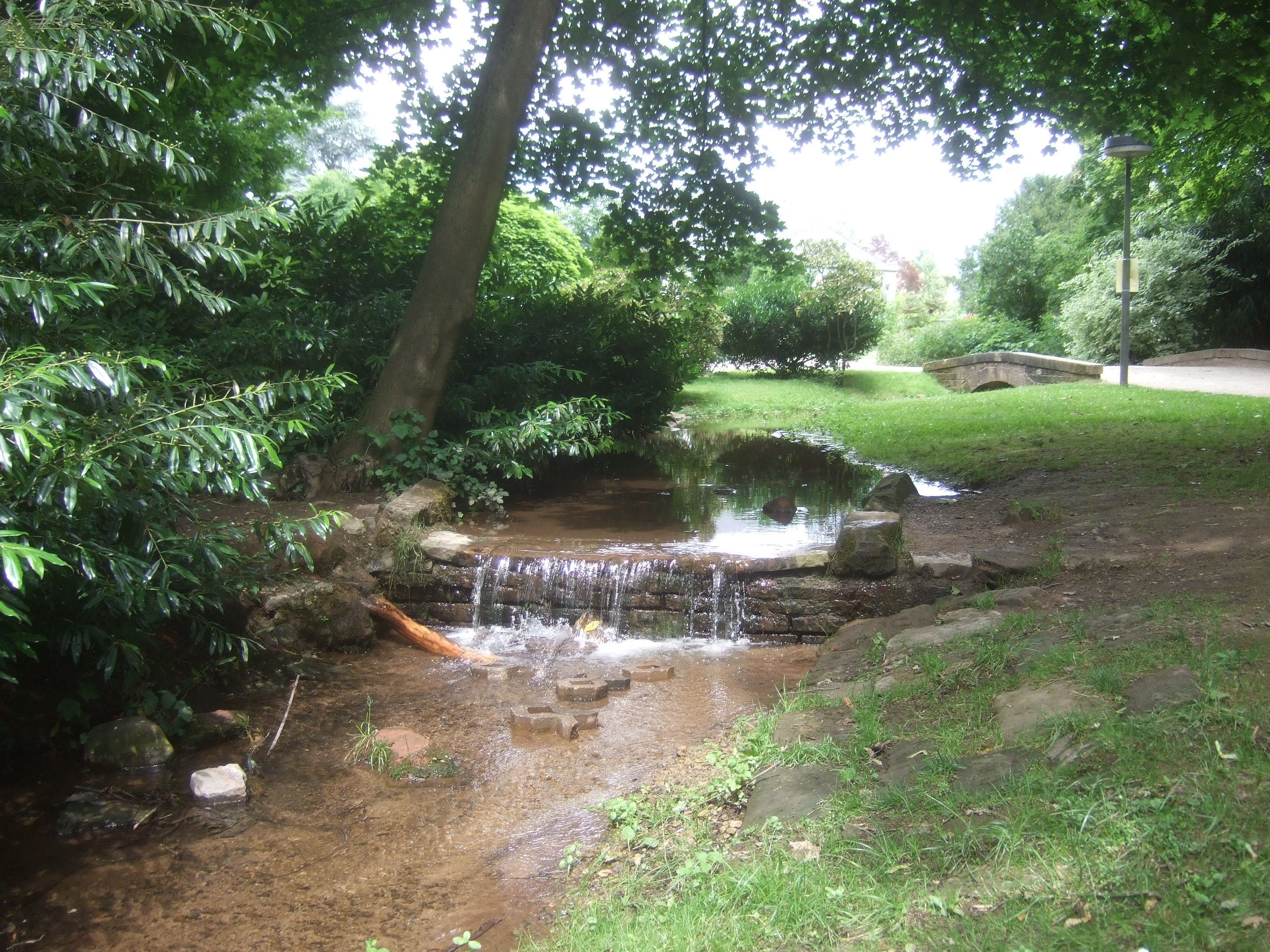 Avelsbach im Nells Park in Trier